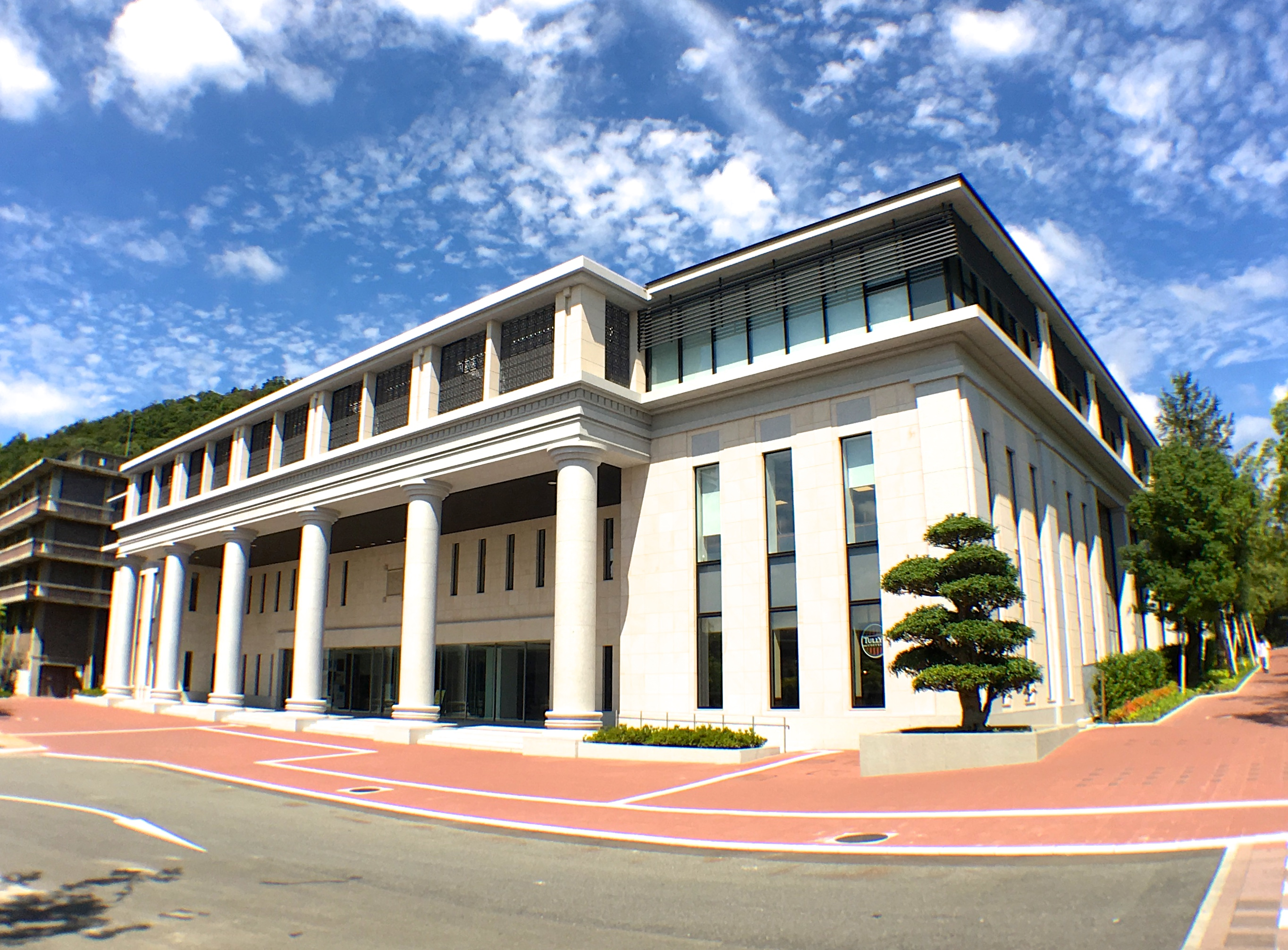 京都市北区の立命館大学衣笠キャンパスにある平井嘉一郎記念図書館。